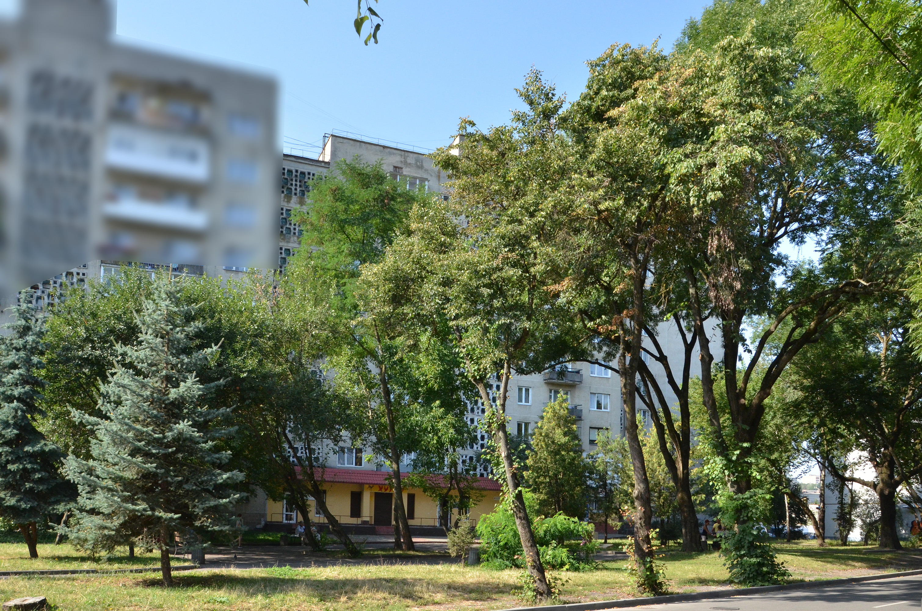 Майбутній Сквер Волонтерів пам'яті Віктора Гурняка.